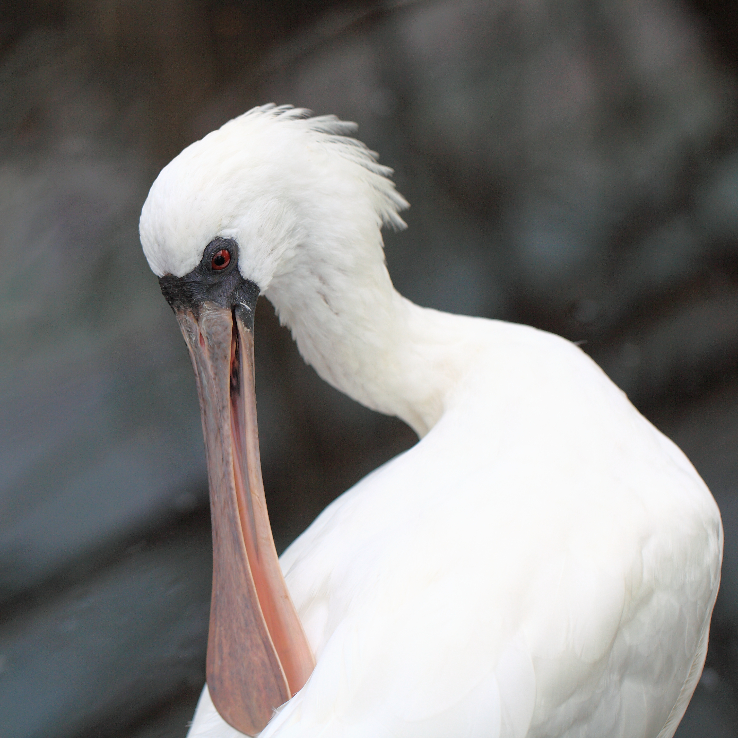 Kakegawa Kacho-en , Kakegawa-shi(city) Shizuoka-ken(Prefecture), Japan 静岡県掛川市(しずおかけん かけがわし) 掛川花鳥園(かけがわかちょうえん)